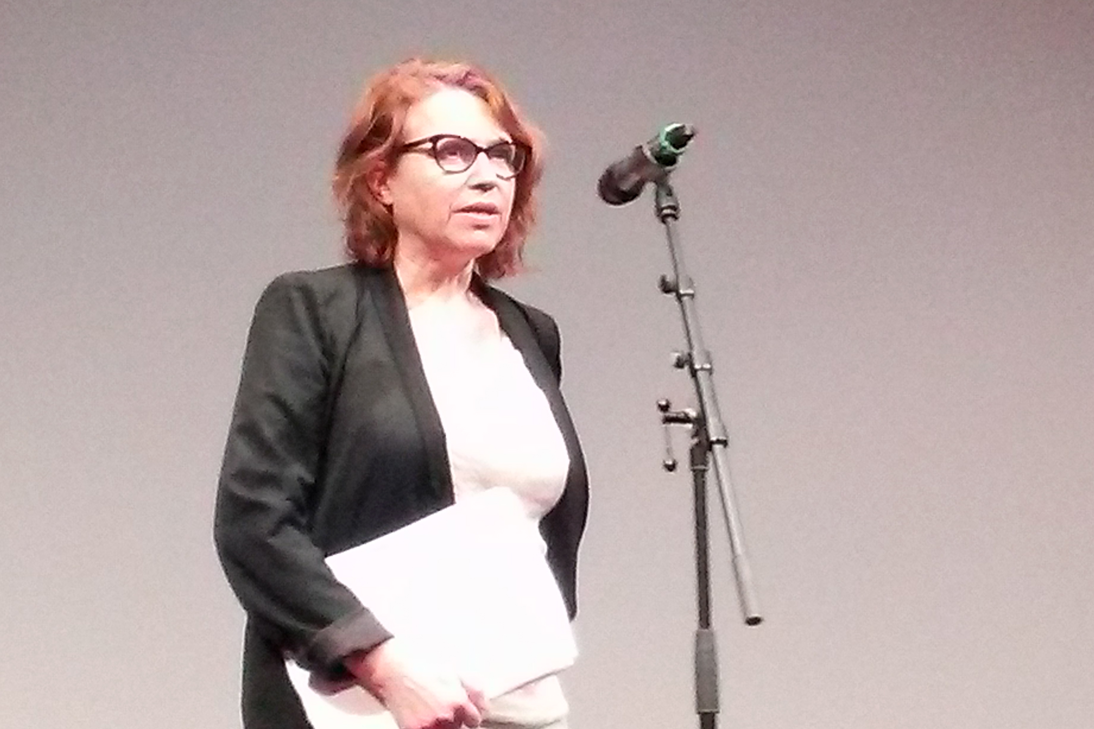 Patricia Mazuy en février 2015 à la Cinémathèque Française à Paris.